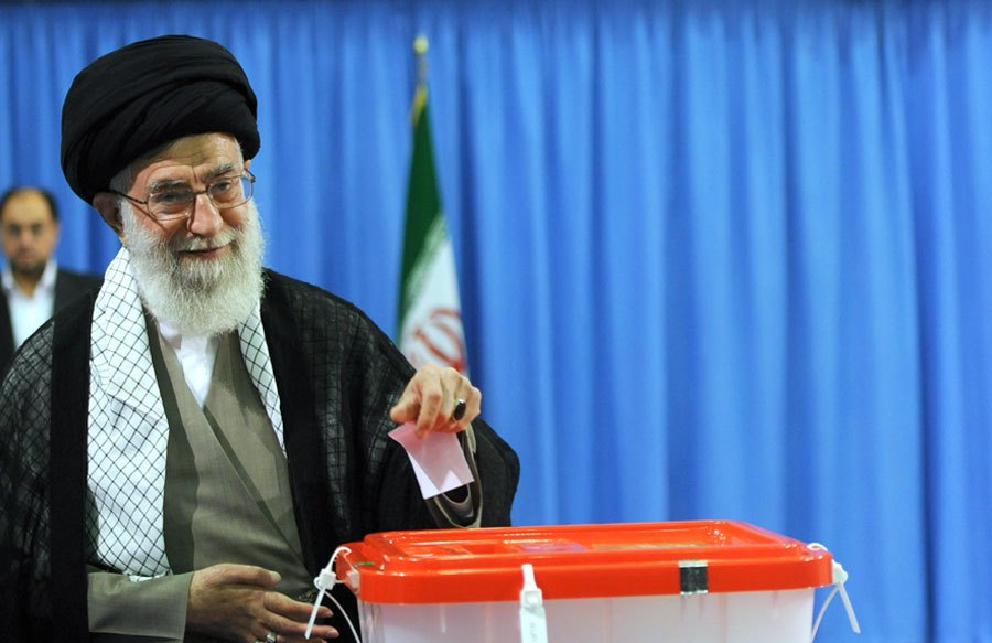 آیت الله سیدعلی خامنه ای رهبر جمهوری اسلامی ایران در انتخابات دوره یازدهم ریاست جمهوری